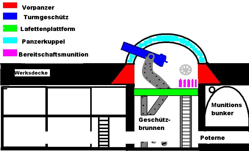 Geschützbrunnen